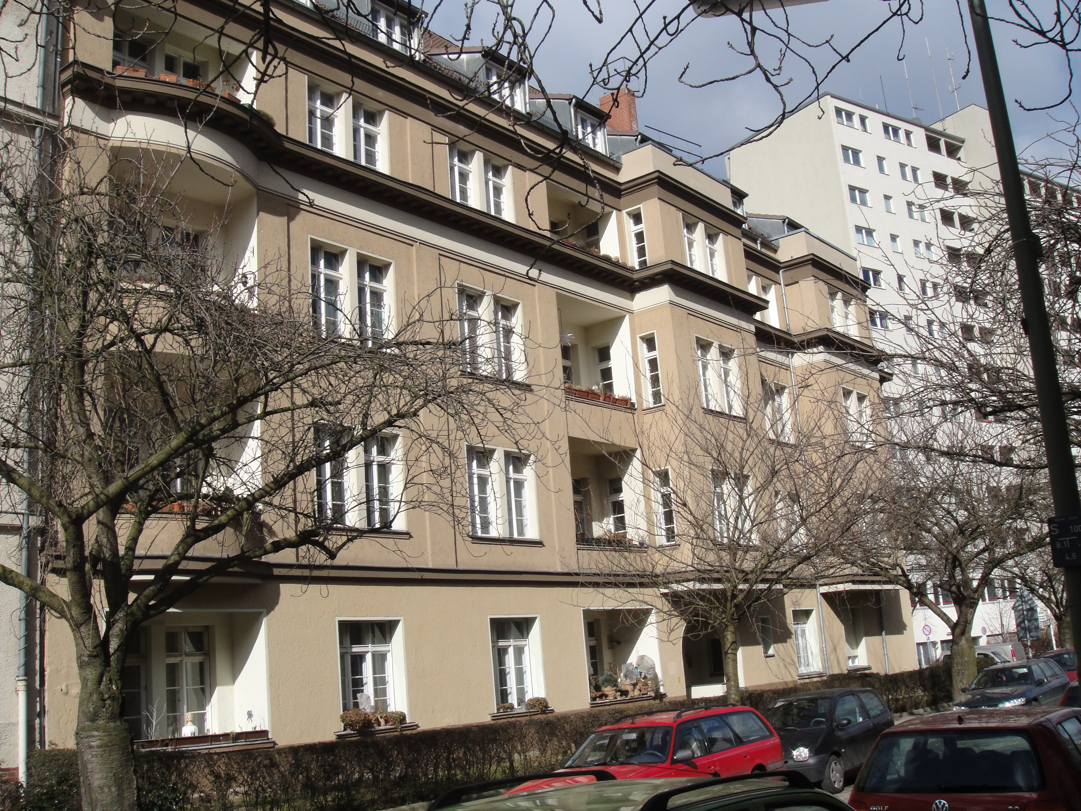 Musterhaus (Ceciliengärten 1) in Berlin-Schöneberg